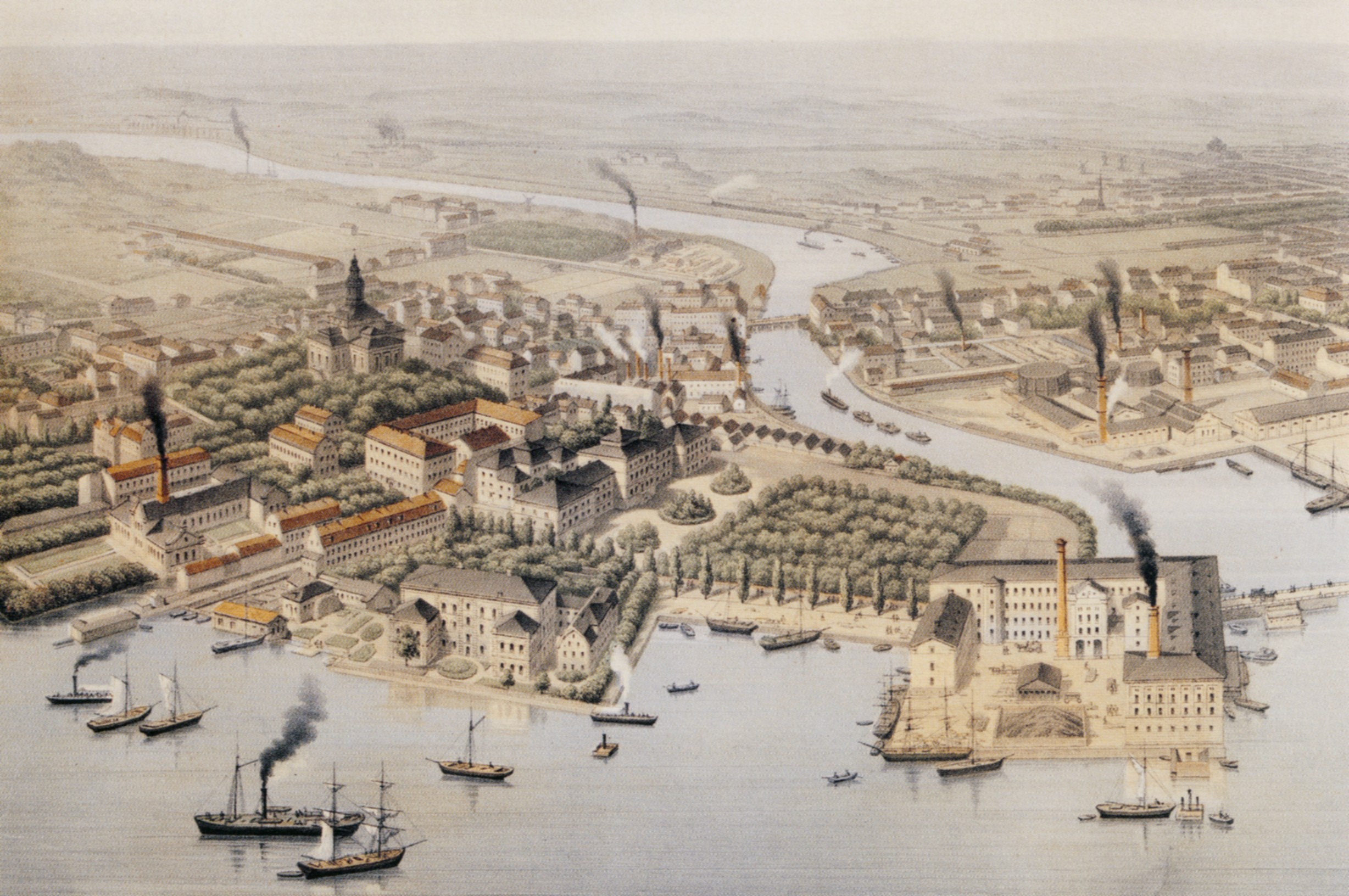 Del av Stockholmspanoramat, Kungsholmens östra delar